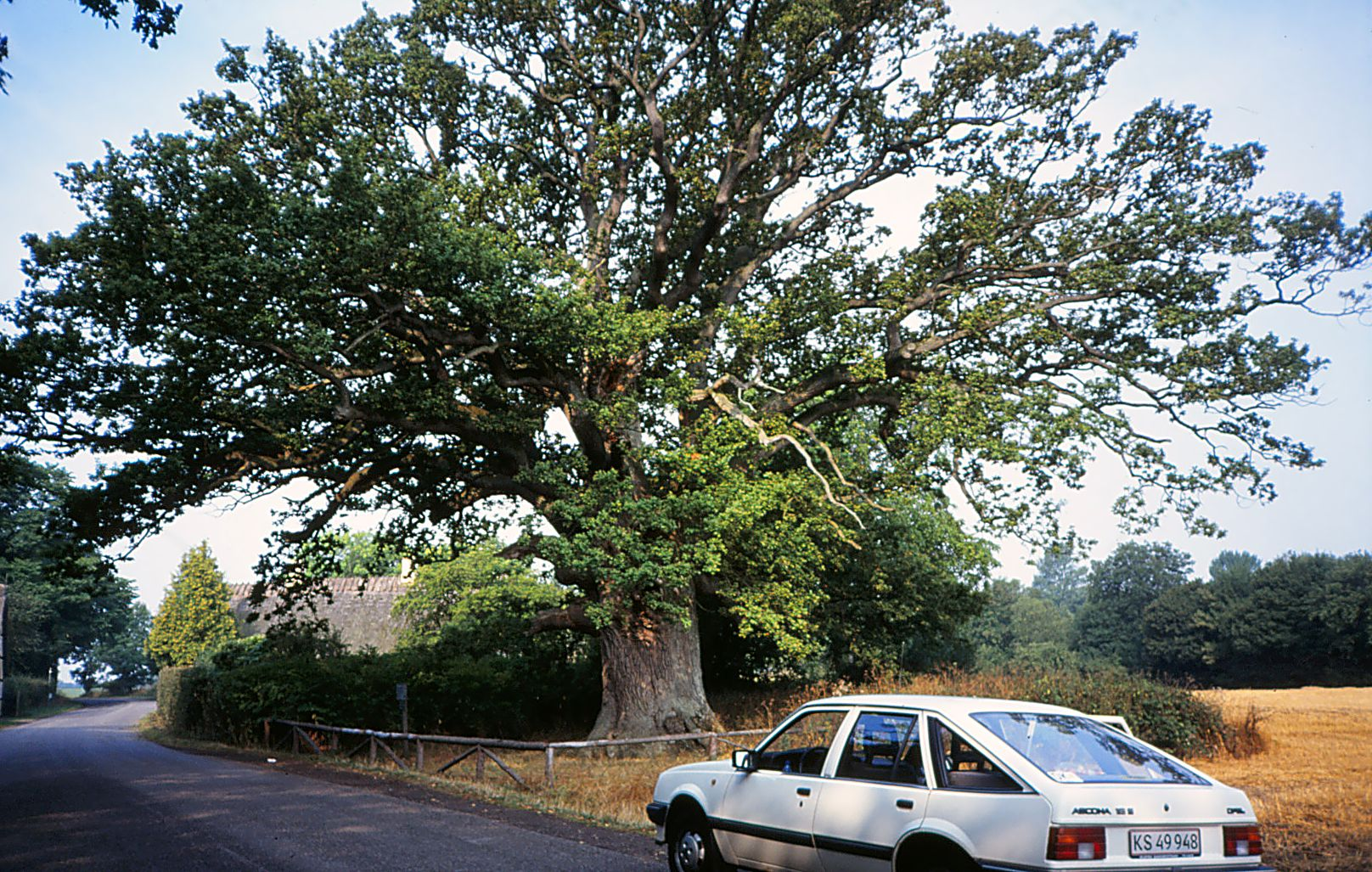 Ambrosius-egen på Tåsinge, den 25. august 1997.